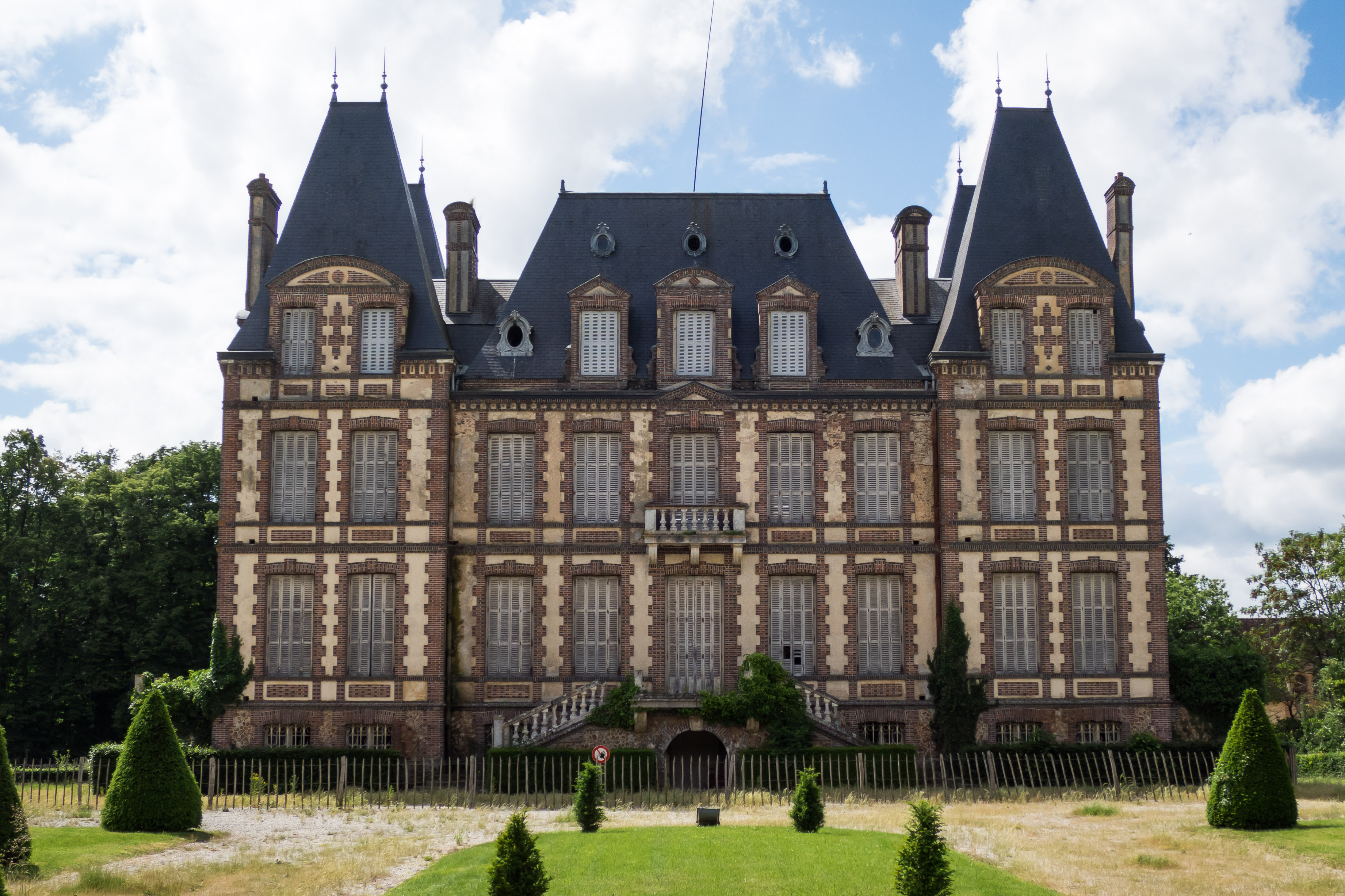 Vue du château des Bois-Francs, dans le domaine de Center Parcs "Les Bois- Francs" (Les Barils, Eure, Normandie, France )